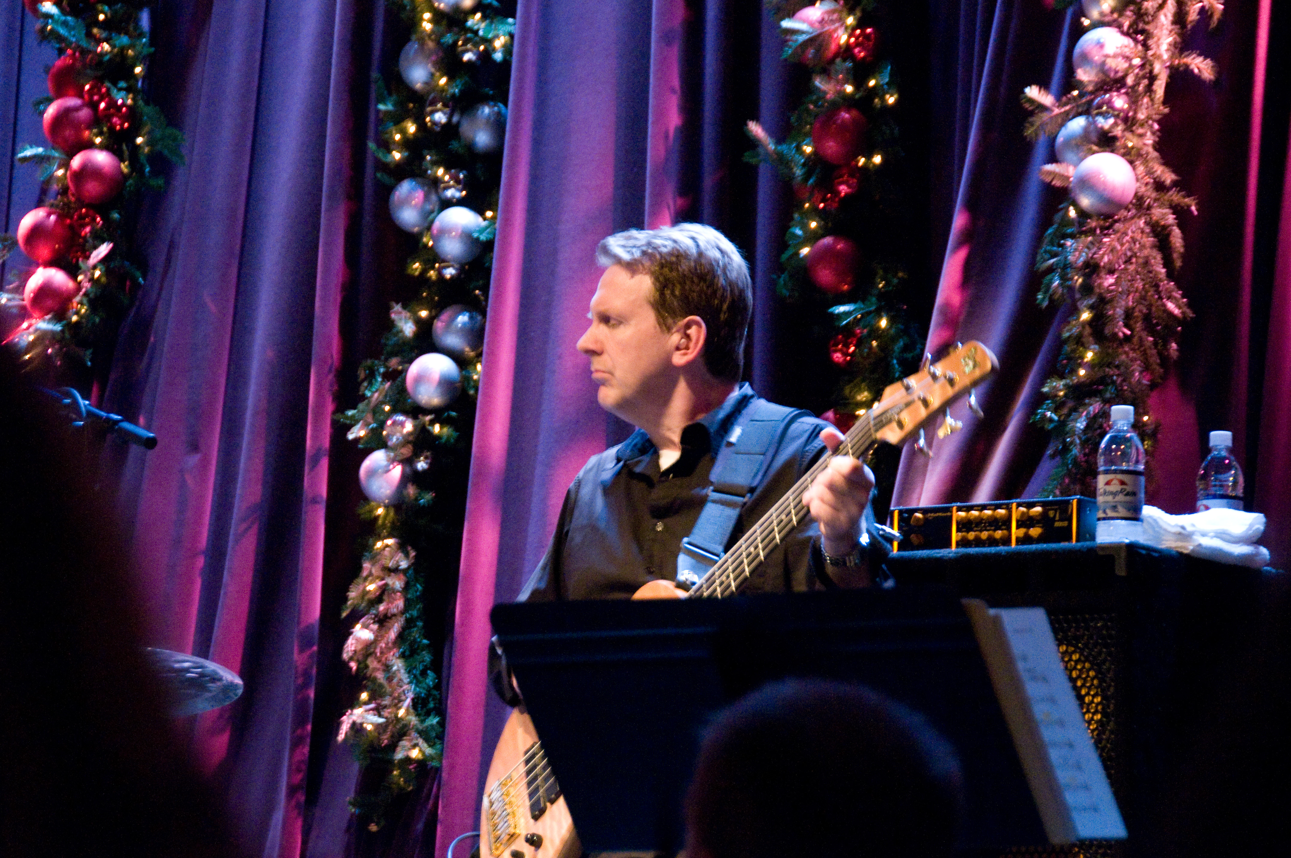 Tom Kennedy